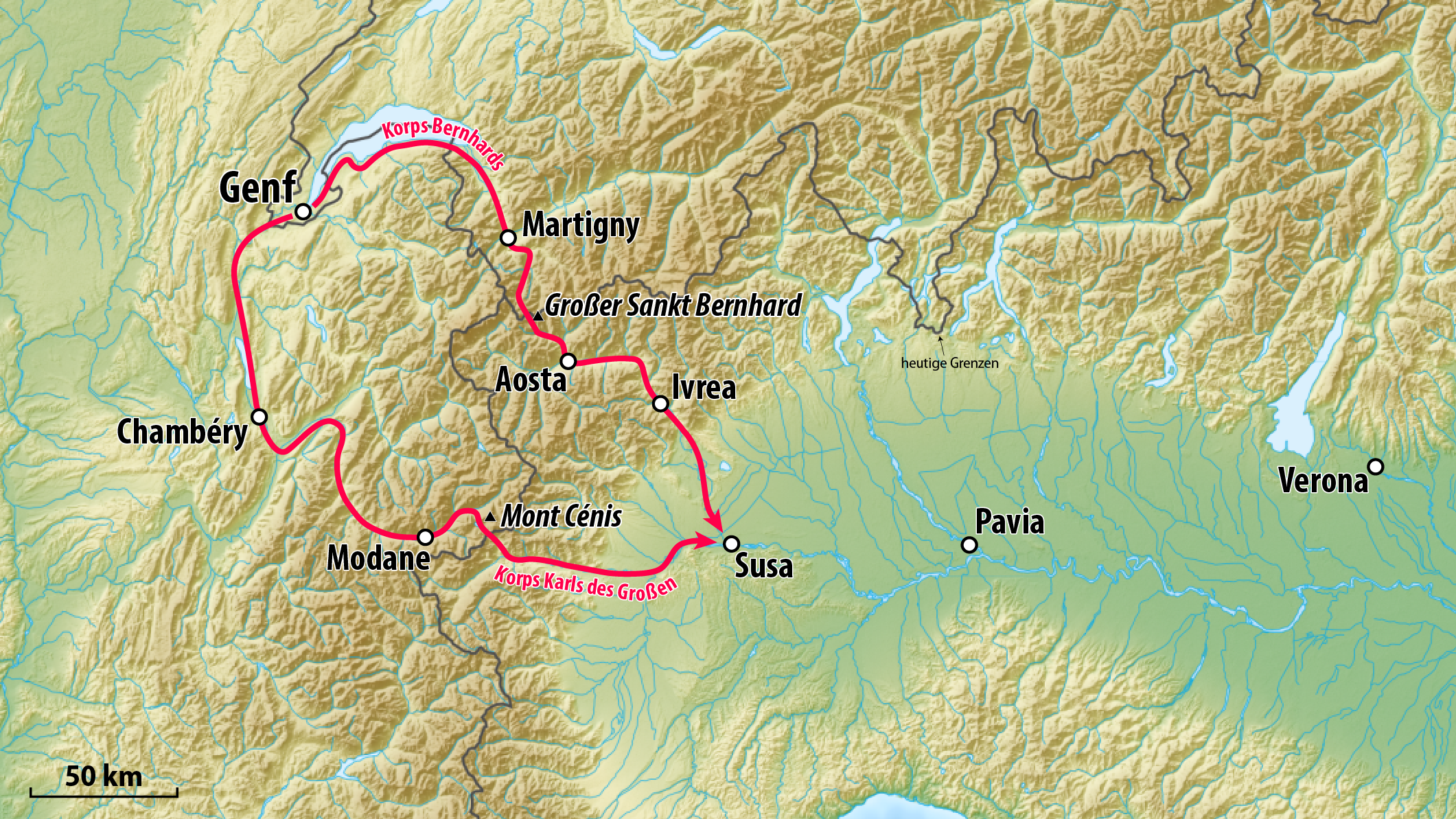 Marschrouten der Alpenüberquerung während des Langobardenfeldzugs im Jahr 773